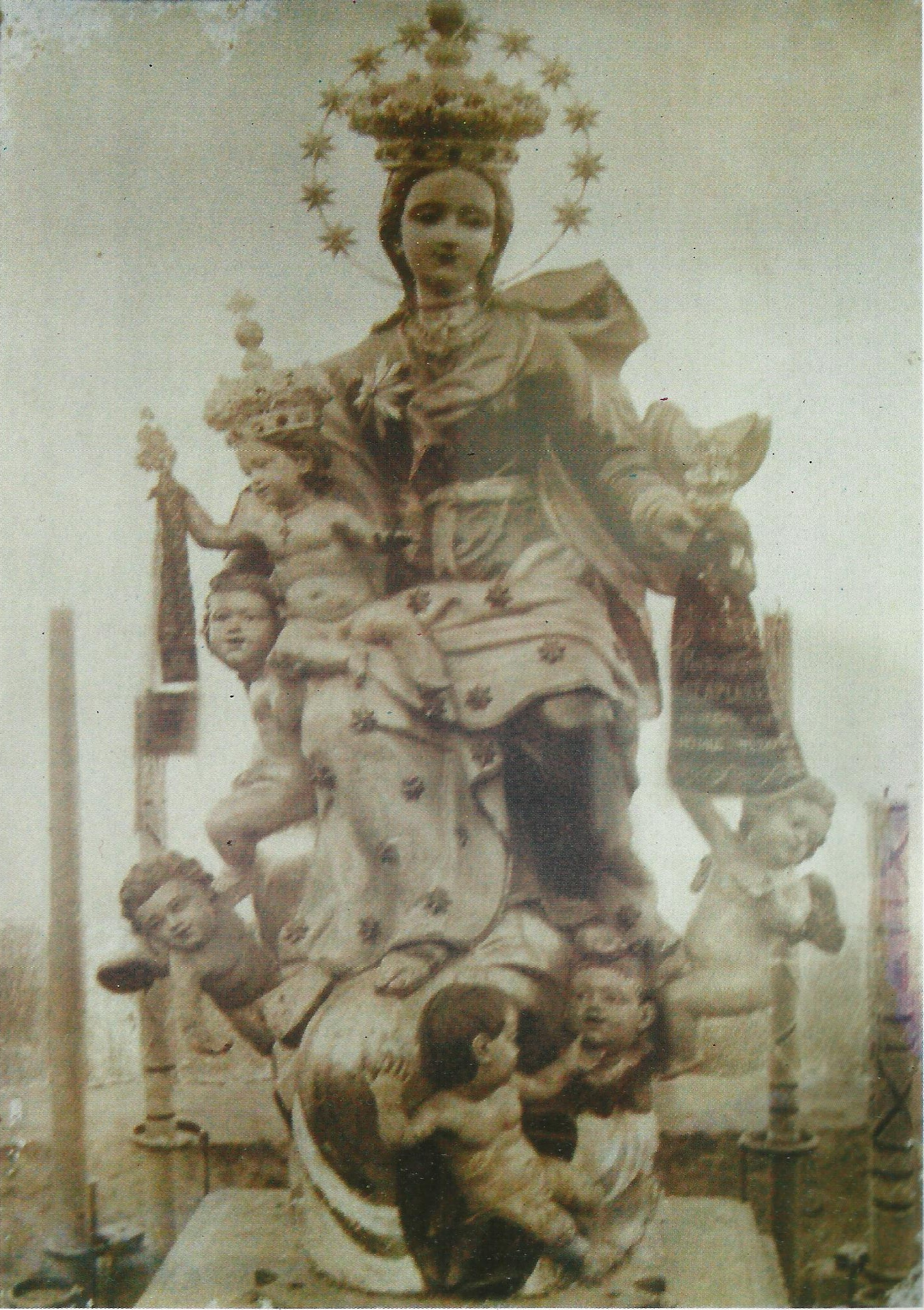 La statua di Maria Santissima del Carmelo, venerata all'interno dell'omonimo santuario a Palmi, in una fotografia risalente al 1894.